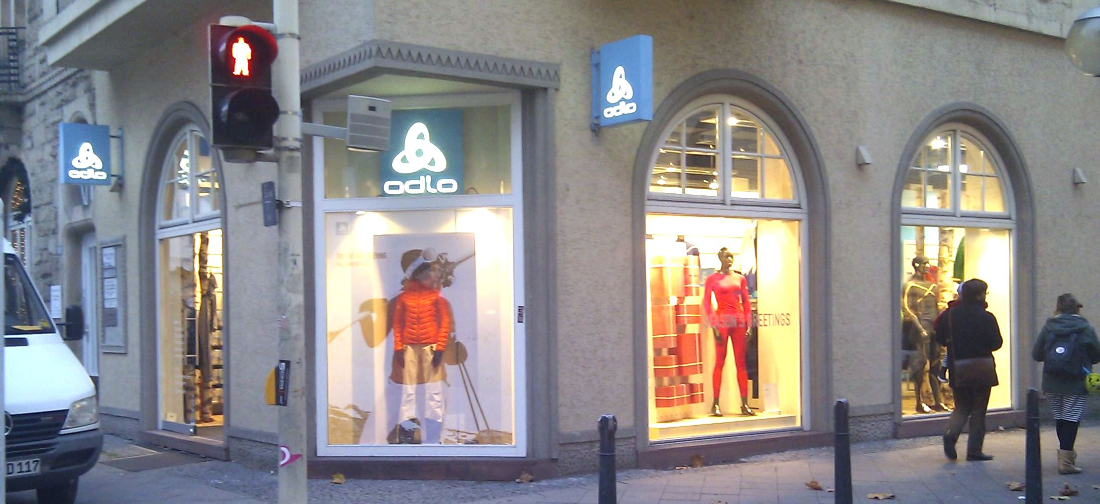 Geschäfte Mannheim O7